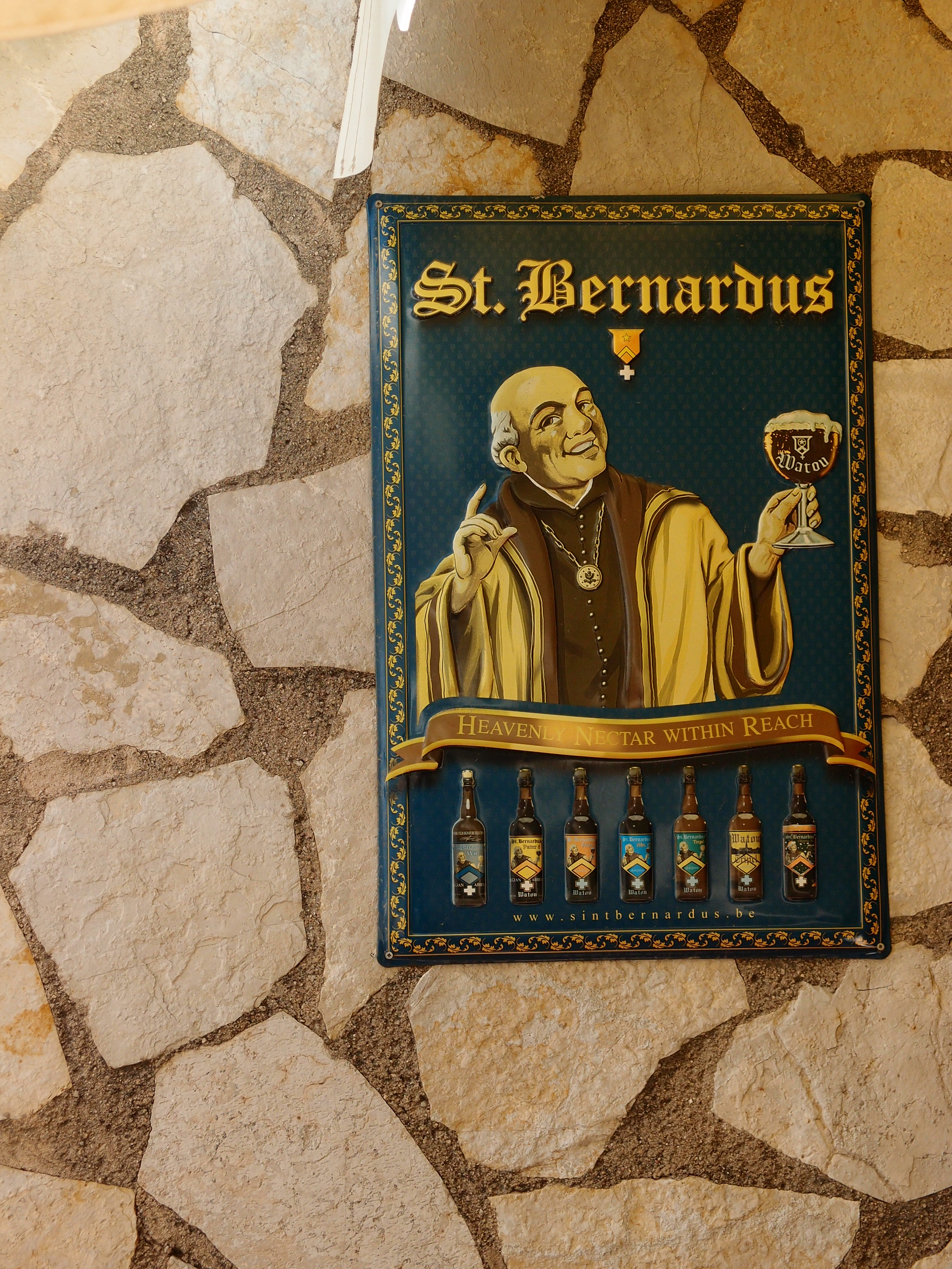 St. Bernardus Außenwerbung im öffentlichen Raum (Hauswand) Datum: 28.09.2011 Urheber: M. Pfeiffer alias Benutzer:Gordito1869 Quelle: Privates Fotoarchiv des Urhebers